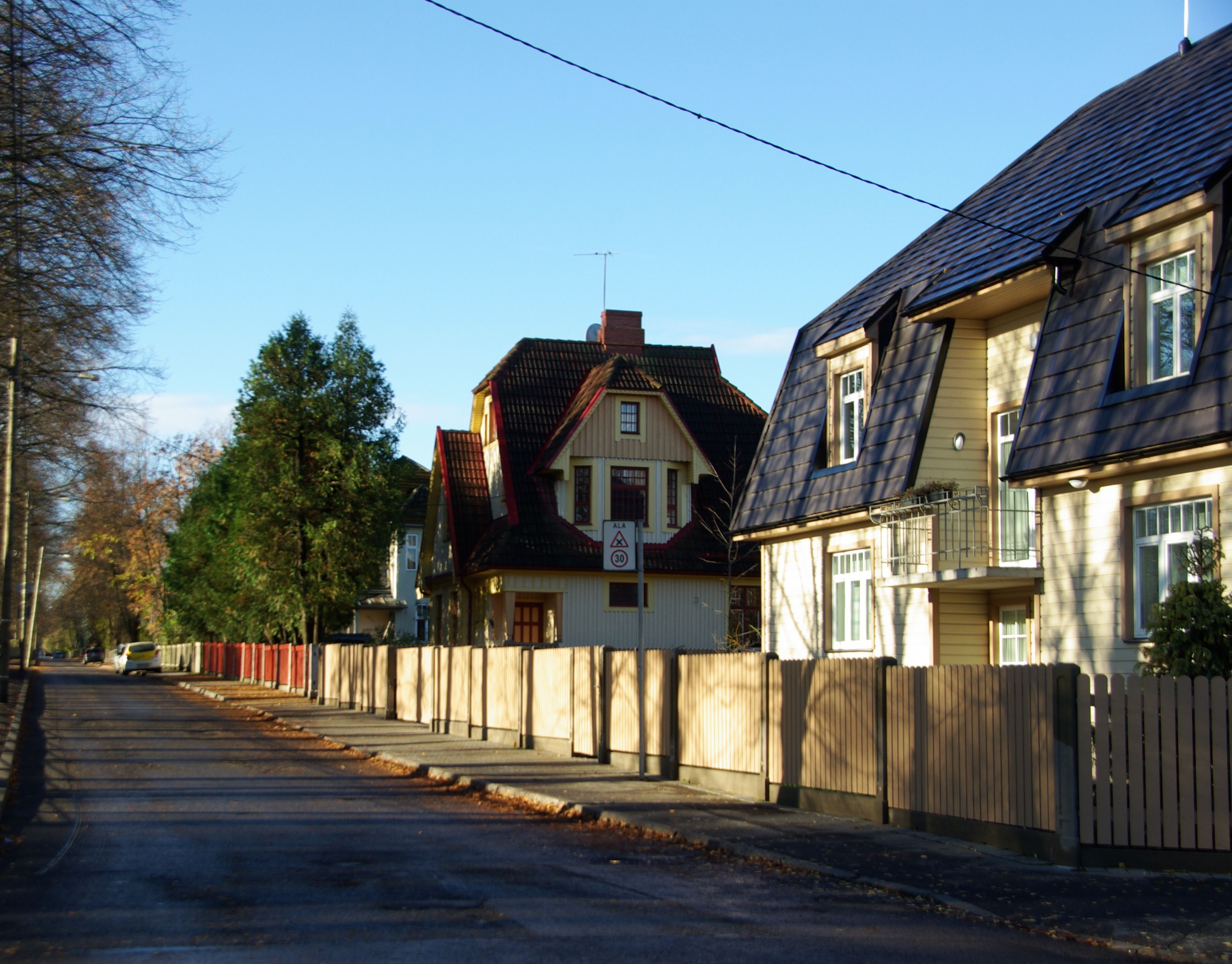 tänav Tartus Tammelinnas